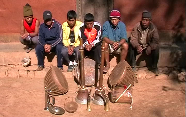 नेपाली: Panchebaja